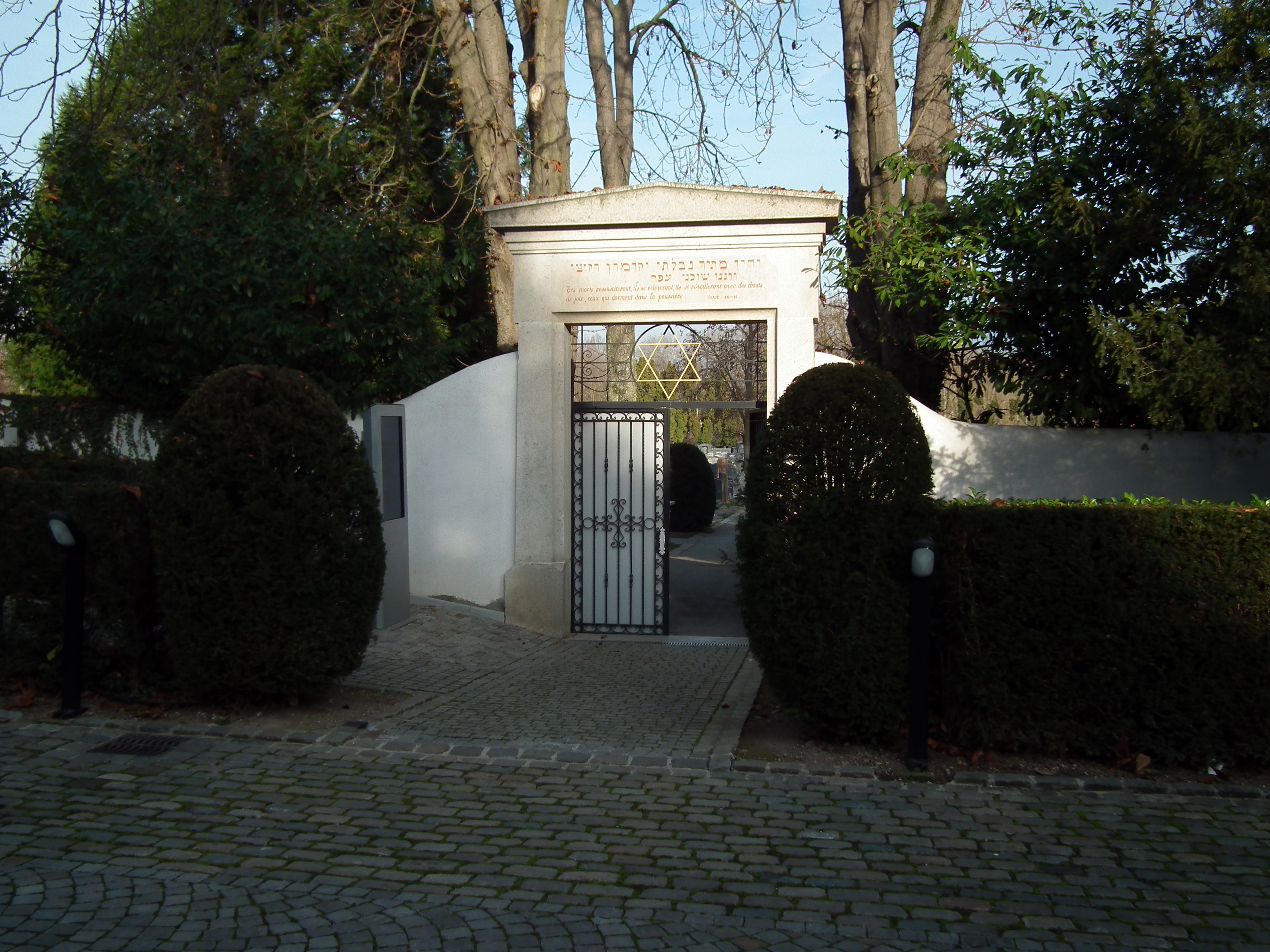 Portail d'entrée du Cimetière israélite de Veyrier